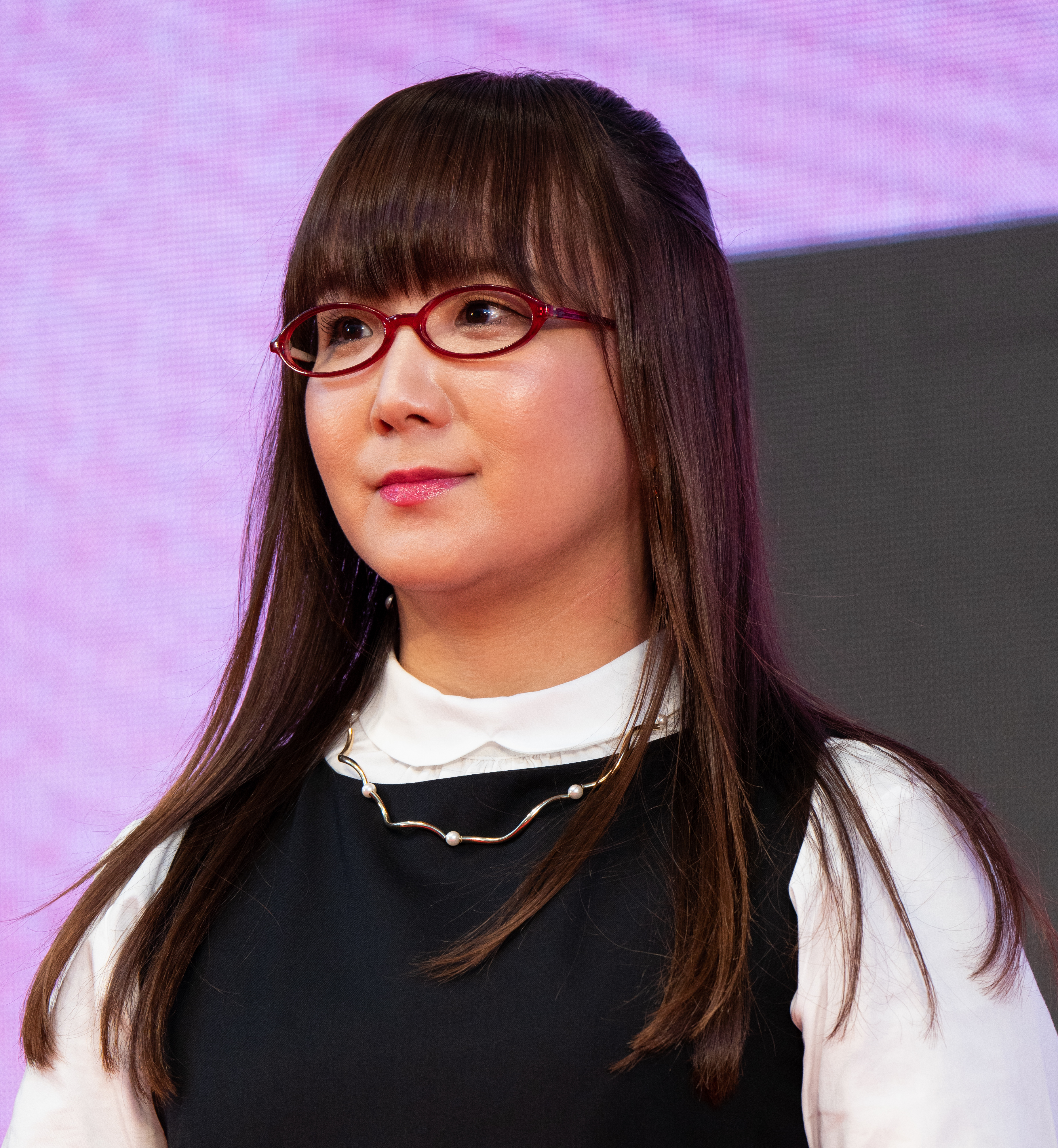 第32回 東京国際映画祭 オープニングセレモニー 奥華子 (殺さない彼と死なない彼女)